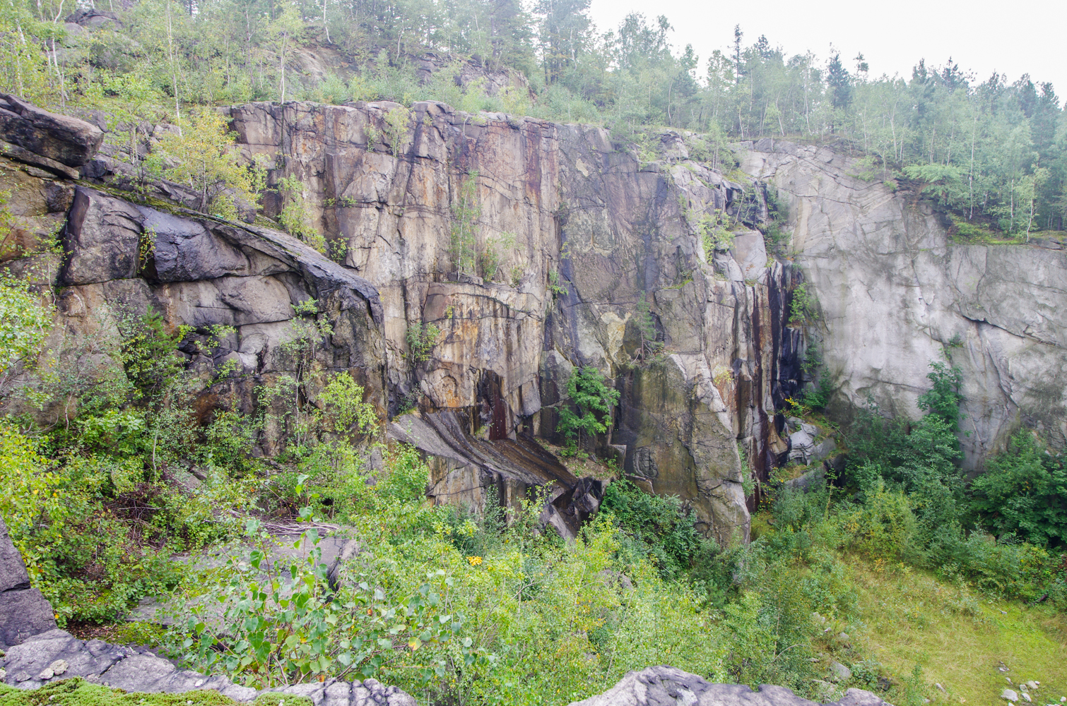 Žulová, žulový lom na Boží hoře, okres Jeseník